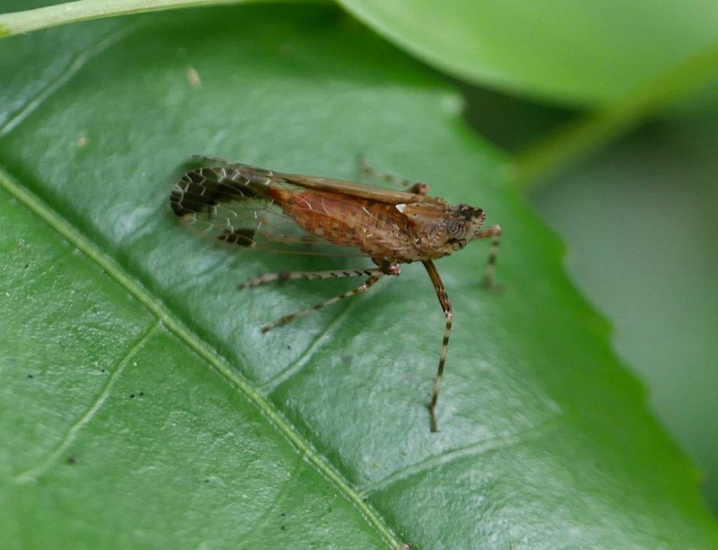 Orthopagus lunulifer：ツマグロスケバ 2018/08/14 和歌山県田辺市：Tanabe City. Wakayama Pref. Japan